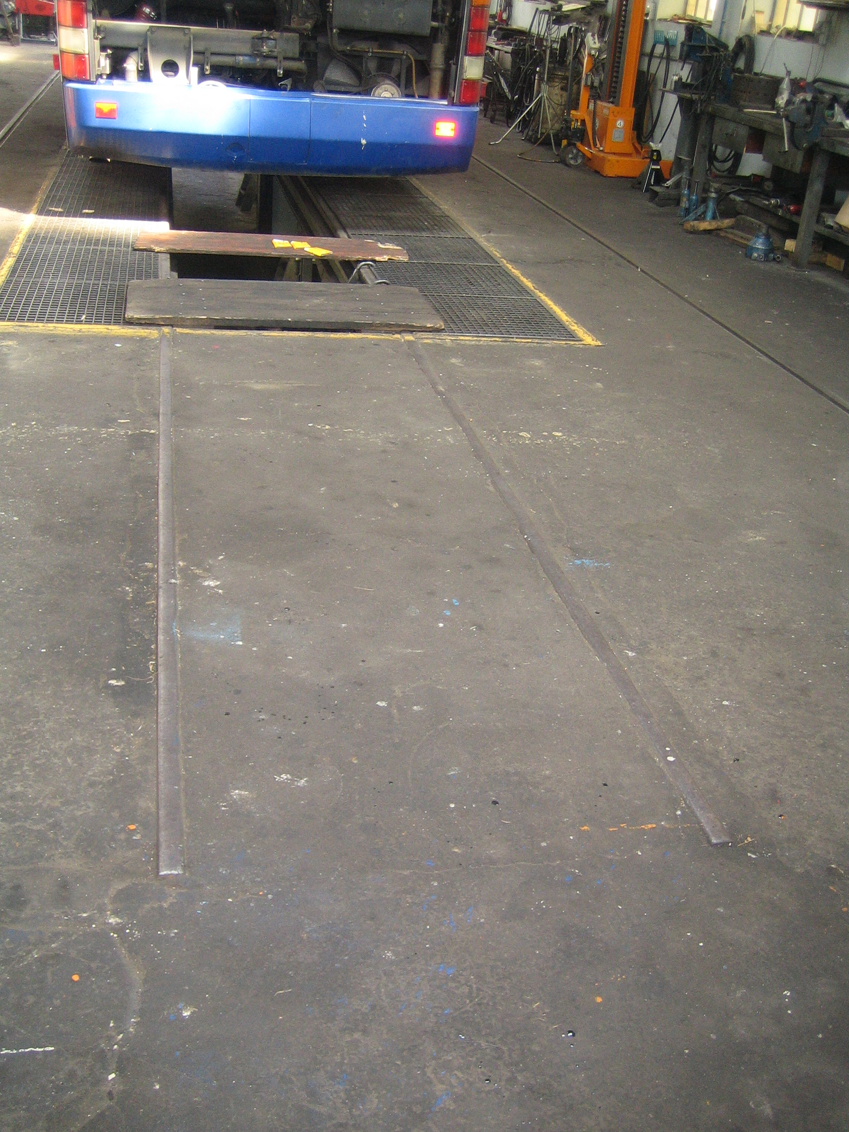 Gleisreste der Pfälzer Oberlandbahn in der Wagenhalle Edenkobens